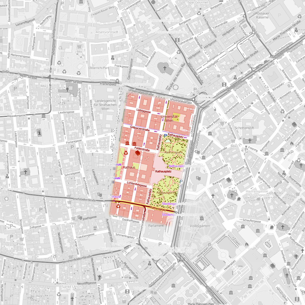 Fläche des bis 1870 existierenden Paradeplatzes in Wien, Grafik von user:Gugerell, Basiskarte: Open Street Map This map may be incomplete, and may contain errors. Don't rely solely on it for navigation.